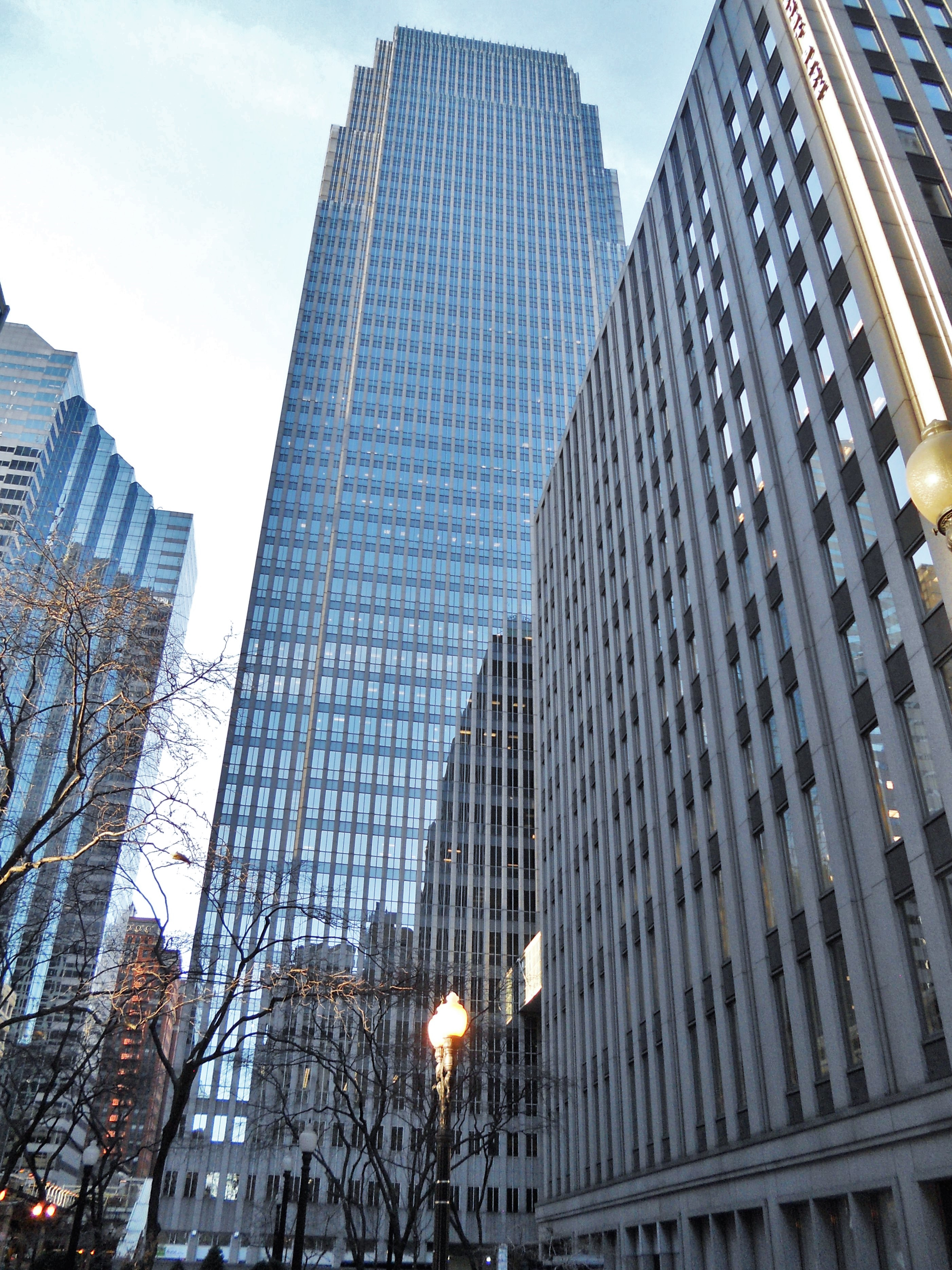 181 West Madison Street 08